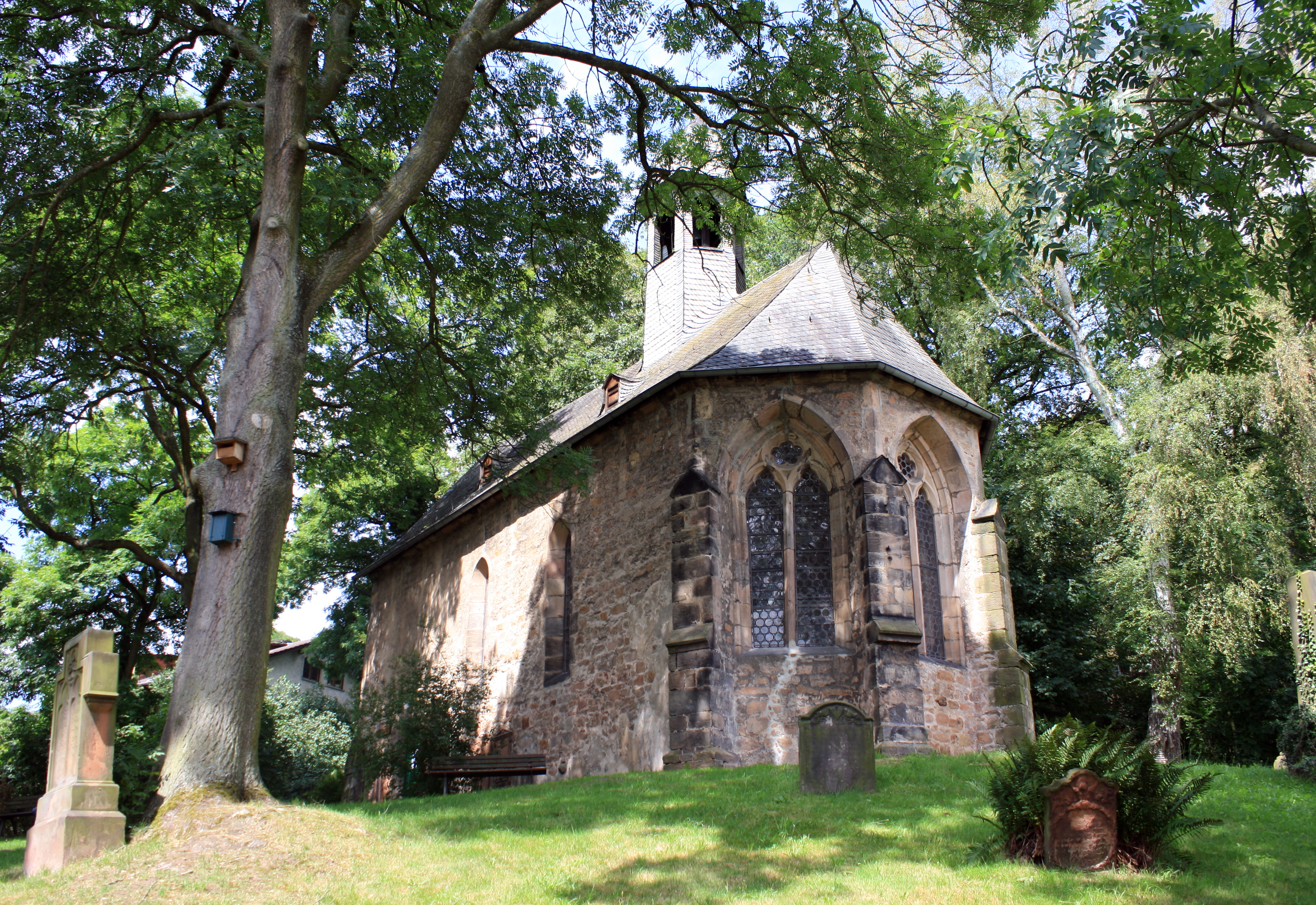 Die St.-Michaels-Kapelle („Michelchen“) in Marburg (gegenüber Hauptportal der Elisabethkirche), erbaut 1268